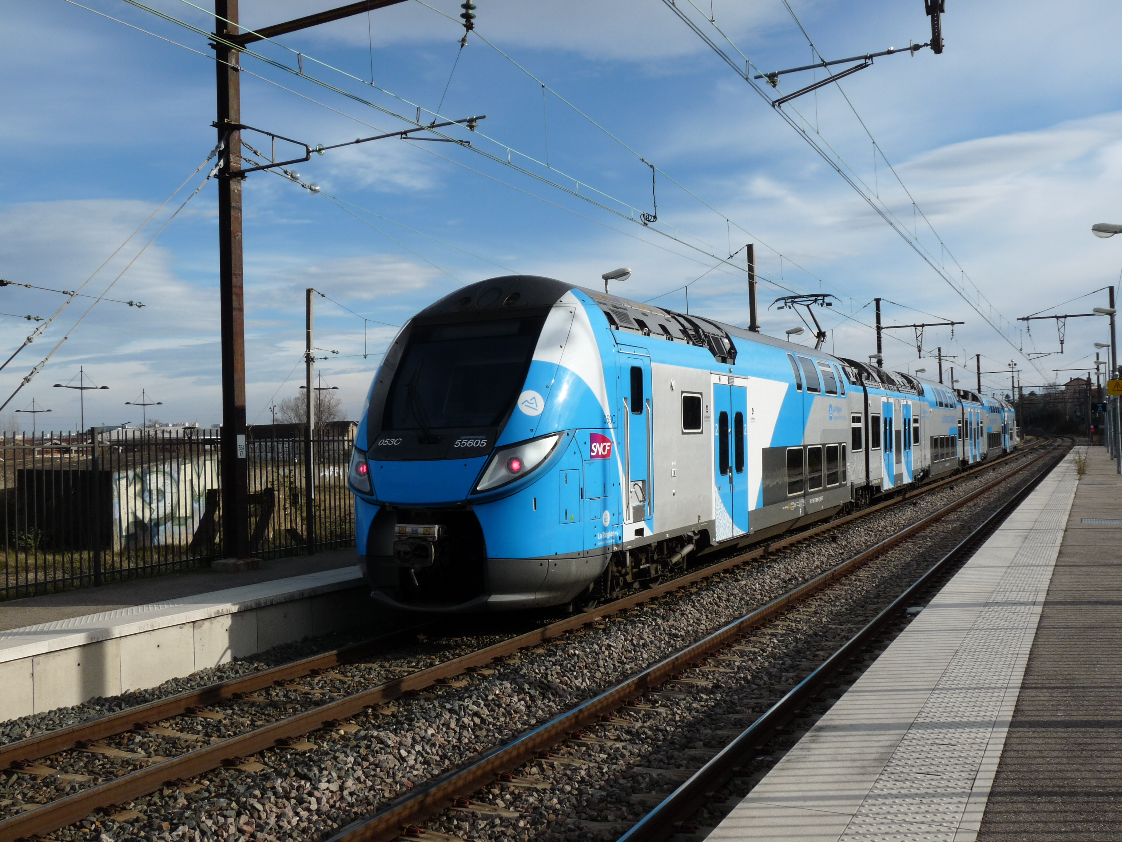 Een TER trein bij Gare d'Oullins